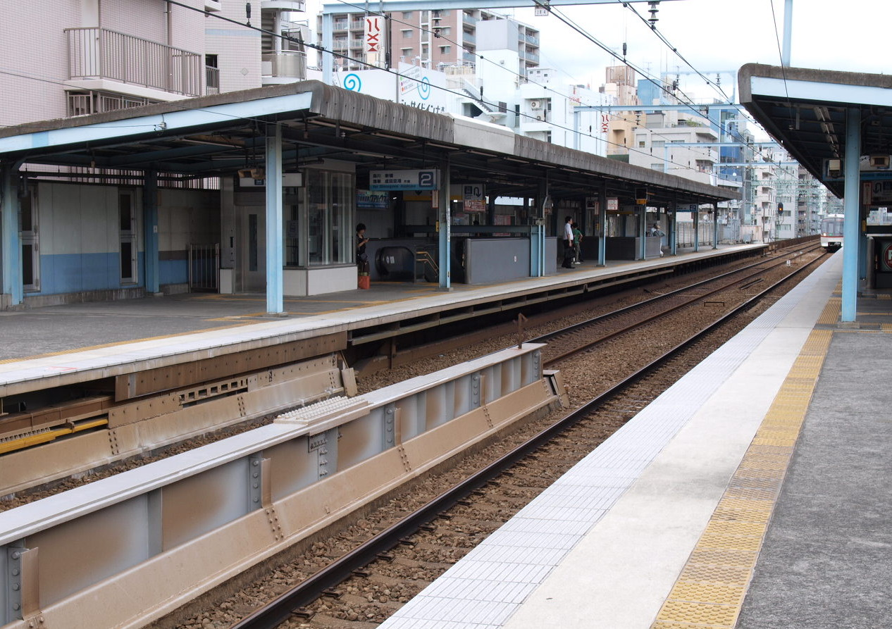 京急大森海岸駅プラットフォーム